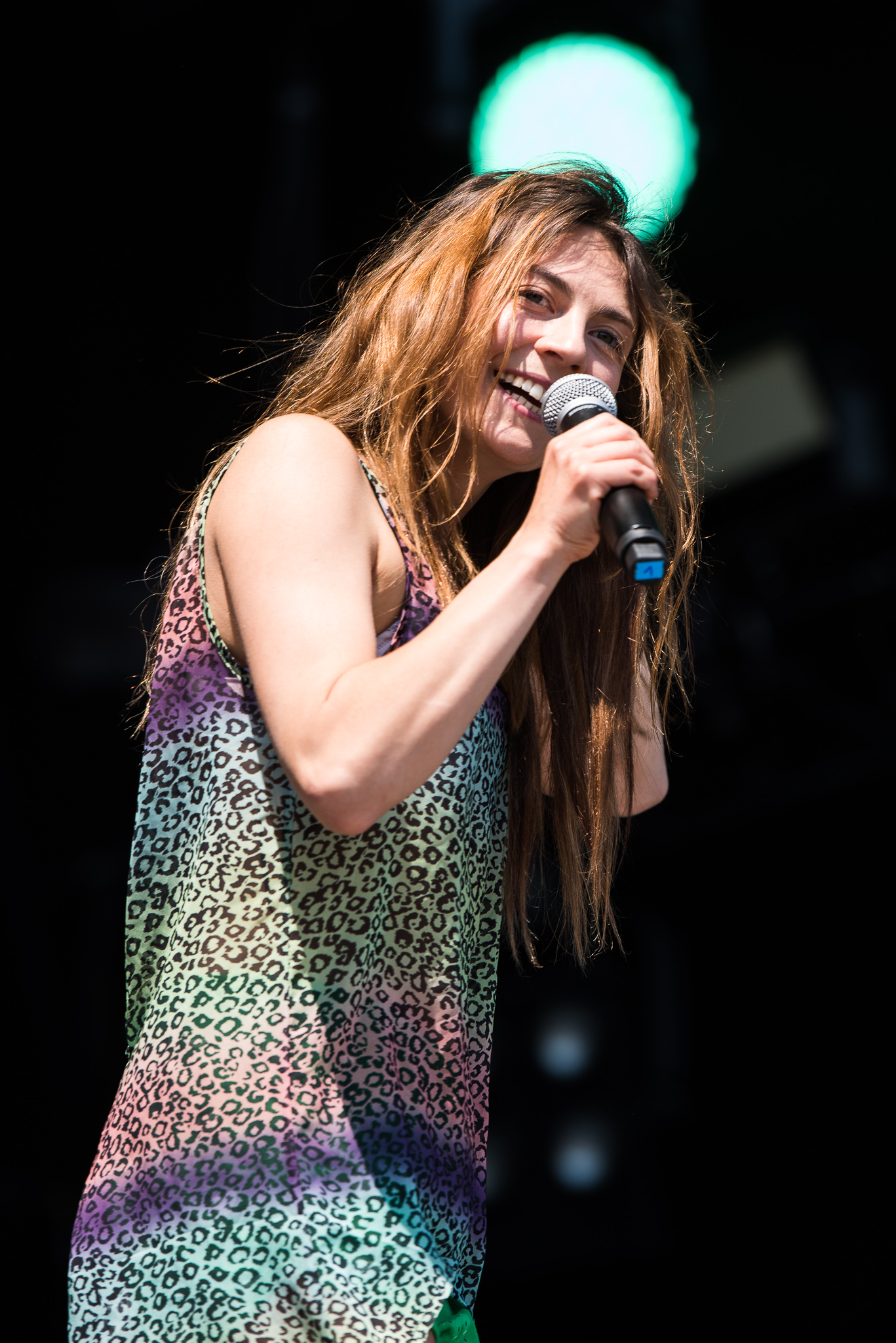 ARGO-Konzerte,Beck's Park Stage,Haiyti,Konzert,Livekonzert,Livemusik,Musik,RiP,Rock im Park 2017,Ronja Zschoche